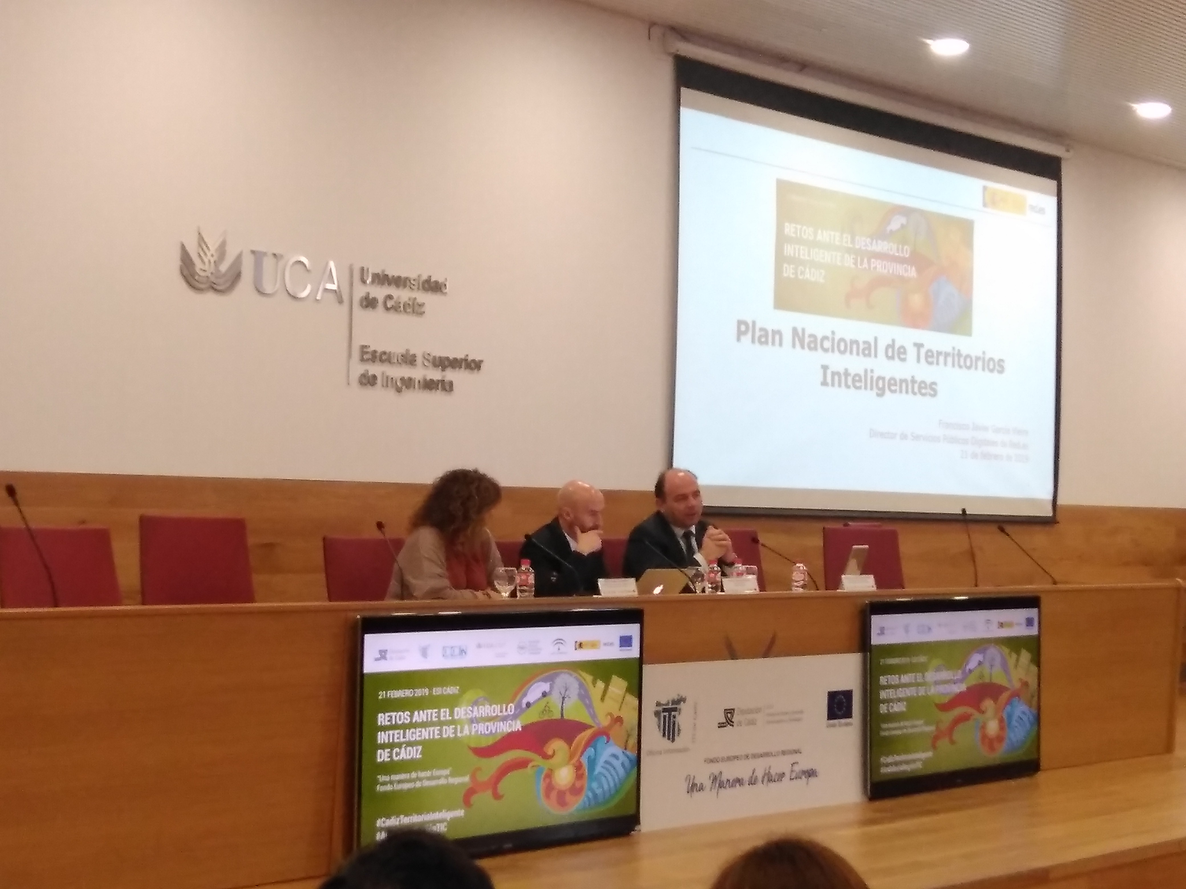 Jornada Retos ante el desarrollo inteligente de la provincia de Cádiz. Escuela Superior de Ingeniería de la Universidad de Cádiz. A la derecha Francisco Javier García Vieira, Director de Servicios Públicos Digitales de Red.es